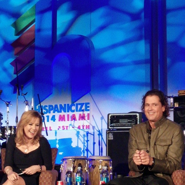 Carlos Vives interviewed by Ana María Canseco at Latinovator Award Luncheon. #hispz14 #estadiodetodos Carlos Vives interviewed by Ana María Canseco. Carlos Vives entrevistado por Ana María Canseco.